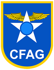 Escudo de la Comandancia de Fuerza Aérea Guatemalteca